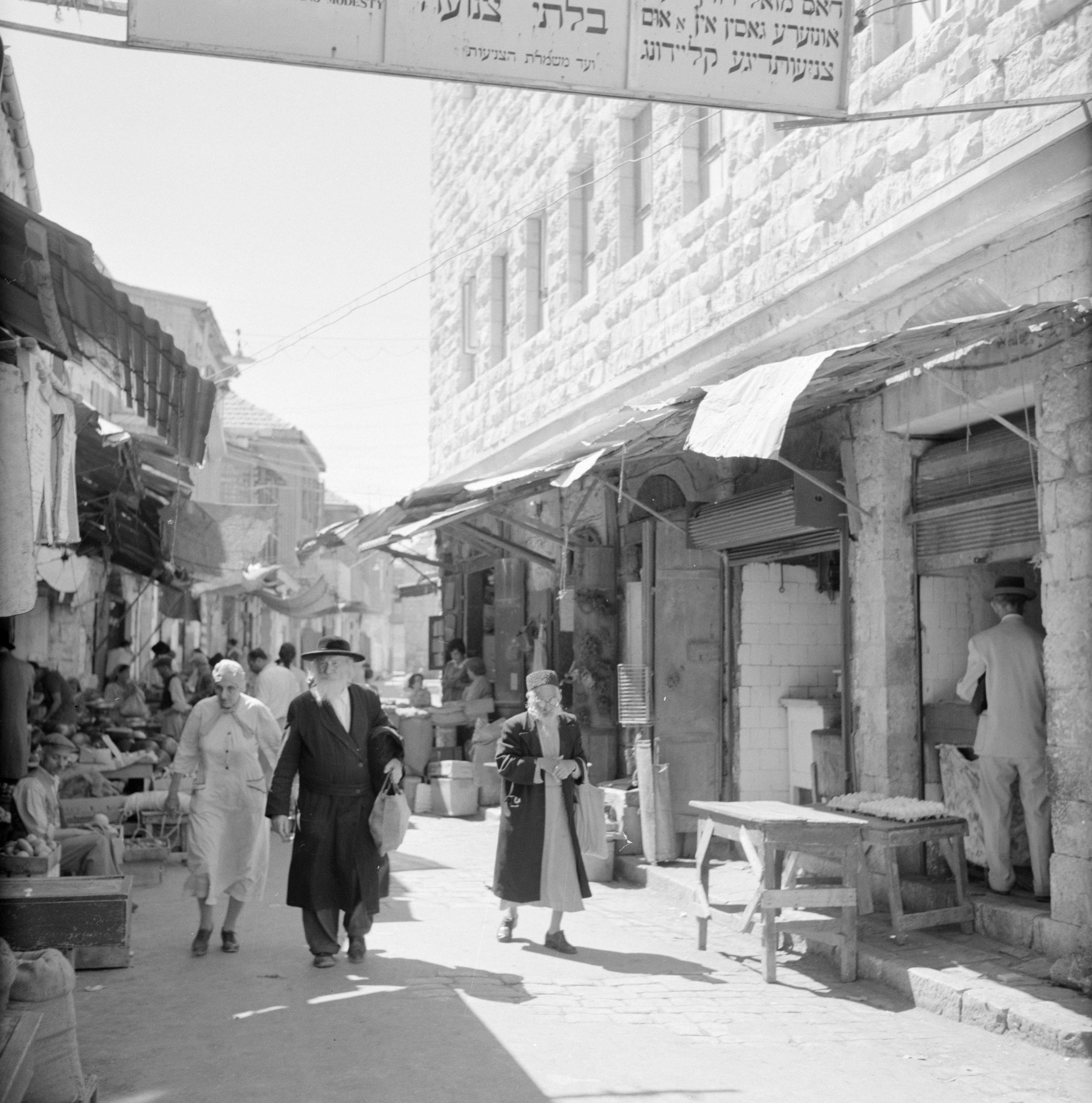 Collectie / Archief : Fotocollectie Van de Poll Reportage / Serie : Israël 1964-1965: Jerusalem (Jeruzalem), Mea Shearim Beschrijving : Bezoekers van een markt op straat Annotatie : Mea Shearim, ook wel Meah Shearim of honderd poorten genaamd, is één van de oudste wijken van Jeruzalem. Het werd vanaf ongeveer 1870 gebouwd door chassidische joden die tot dan toe in de Oude Stad woonden. Daar was echter te weinig plaats en dus kocht men een stuk land ten noordwesten van de stad. Dit land, een moerasgebied, werd bewerkt tot grond om een nieuwe wijk te bouwen: Meah Shearim. De wijk staat anno 2012 bekend als de meest extreemorthodox joodse wijk ter wereld en is de thuisbasis van verschillende chassidische bewegingen Datum : 1964 Locatie : Israël, Jeruzalem, Mea Shearim Trefwoorden : bezoekers, markten, straatbeelden, woonwijken Fotograaf : Poll, Willem van de, [onbekend] Auteursrechthebbende : Nationaal Archief Materiaalsoort : Negatief (zwart/wit) Nummer archiefinventaris : bekijk toegang 2.24.14.02 Bestanddeelnummer : 255-2485